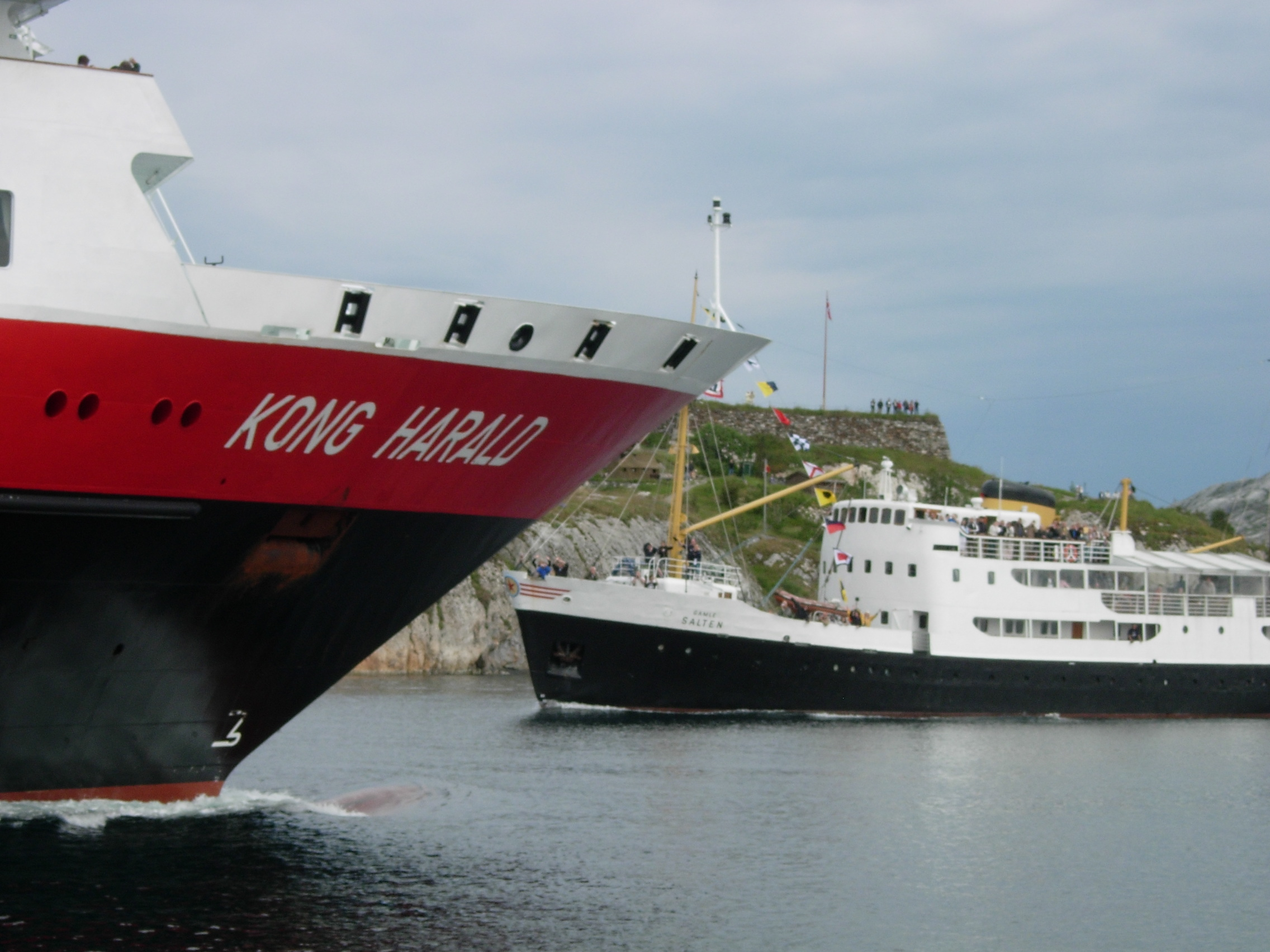 «Kong Harald» og MS «Salten» møtes i Bodø under forbundets Kystens landsstevne 2006 i Bodø. To ulike tidsepoker møtes